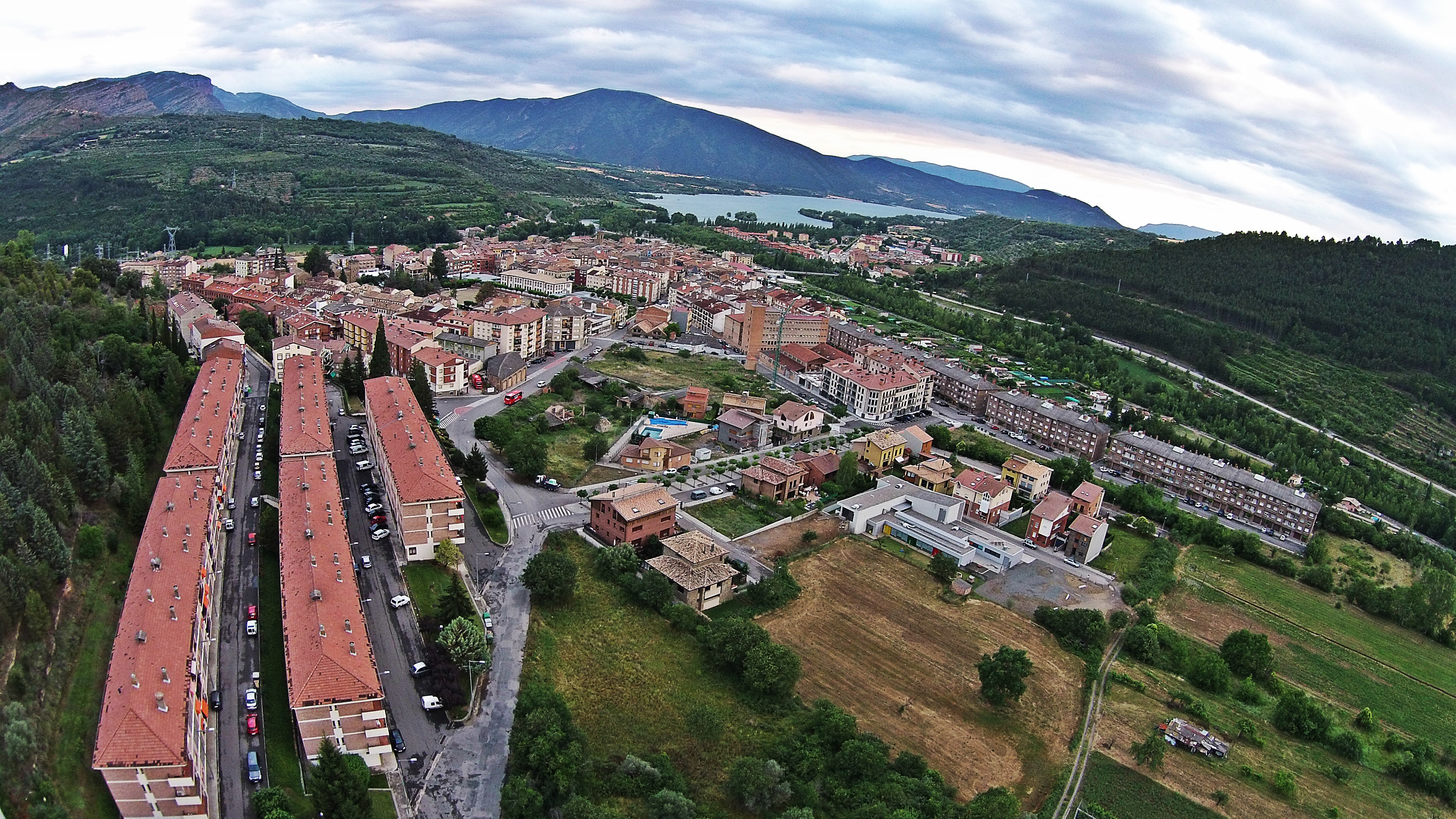 Foto aerea de La Pobla de Segur